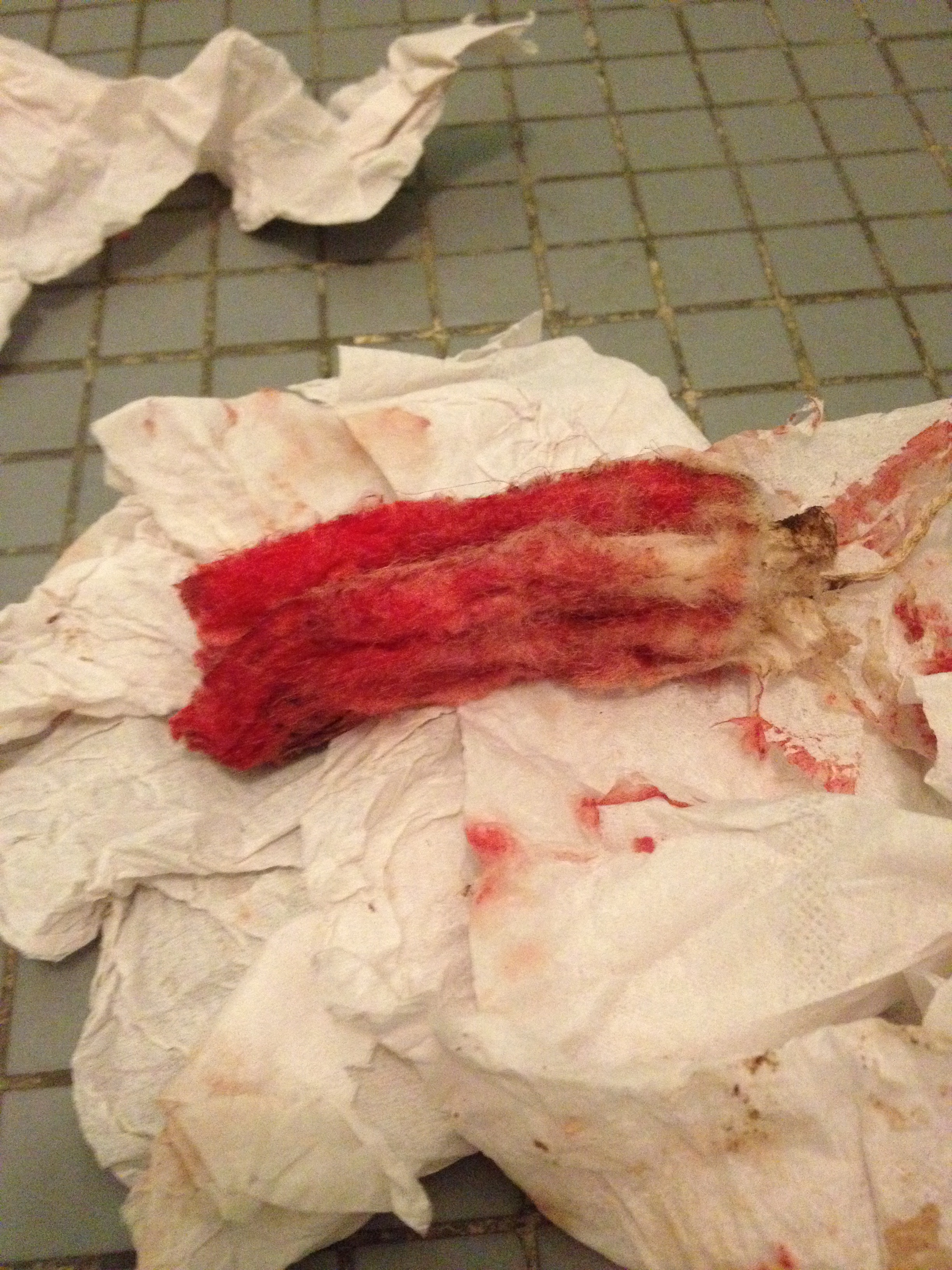 tampon hygiénique usagé